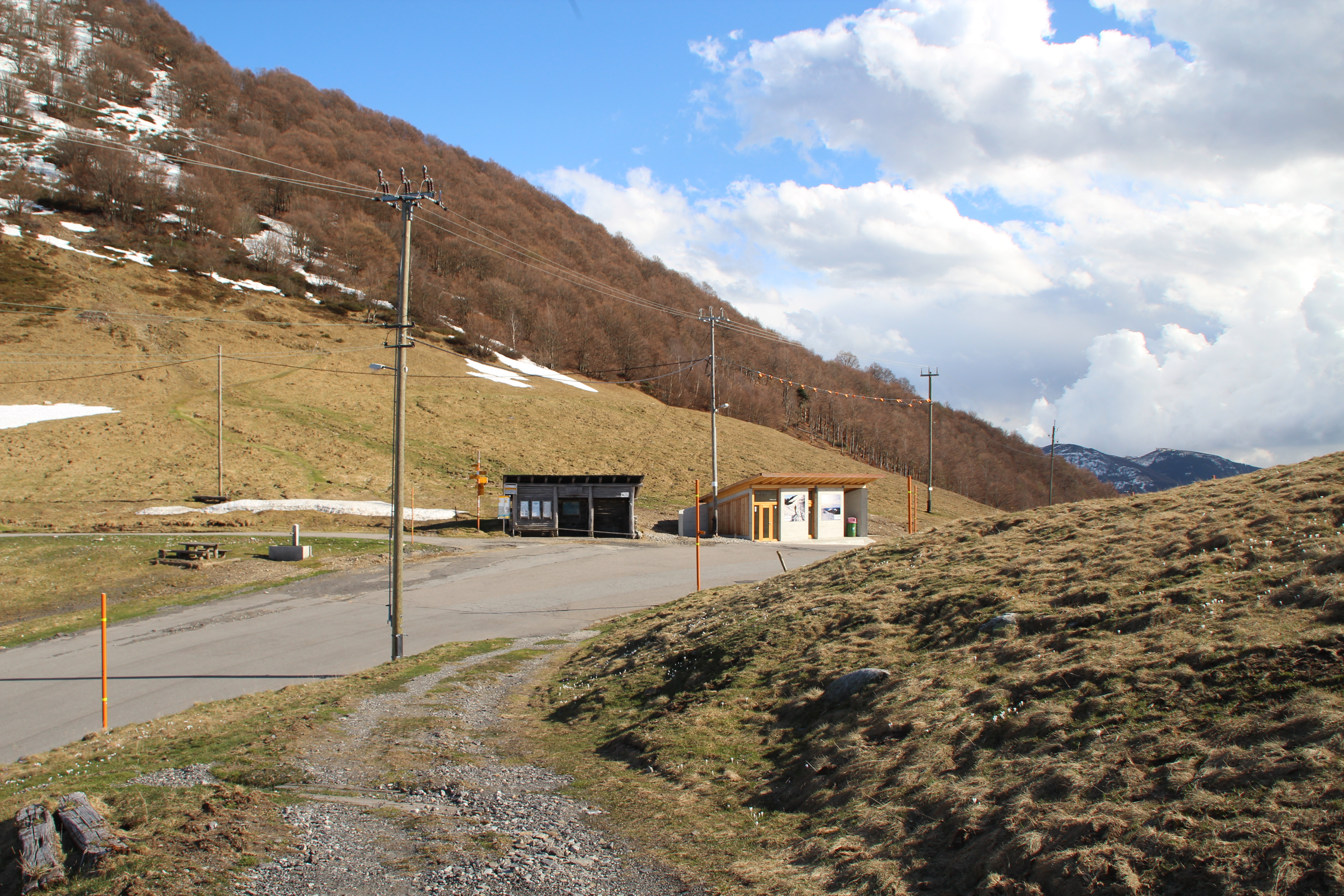 Passhöhe Alpe di Neggia